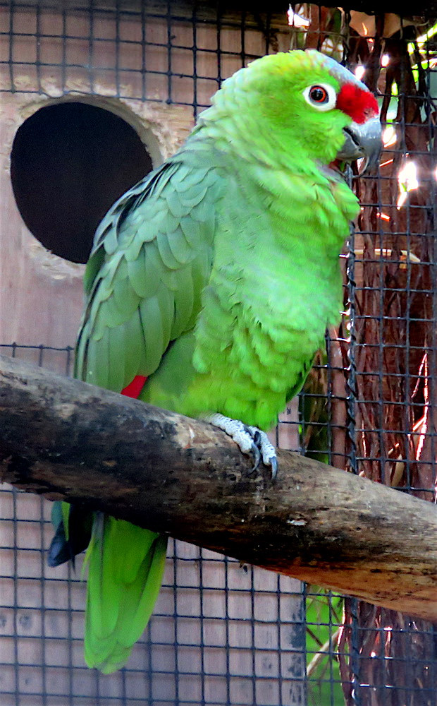 Amazona diadema - amazon cu diademă - Diademed amazon - amazone à diadème